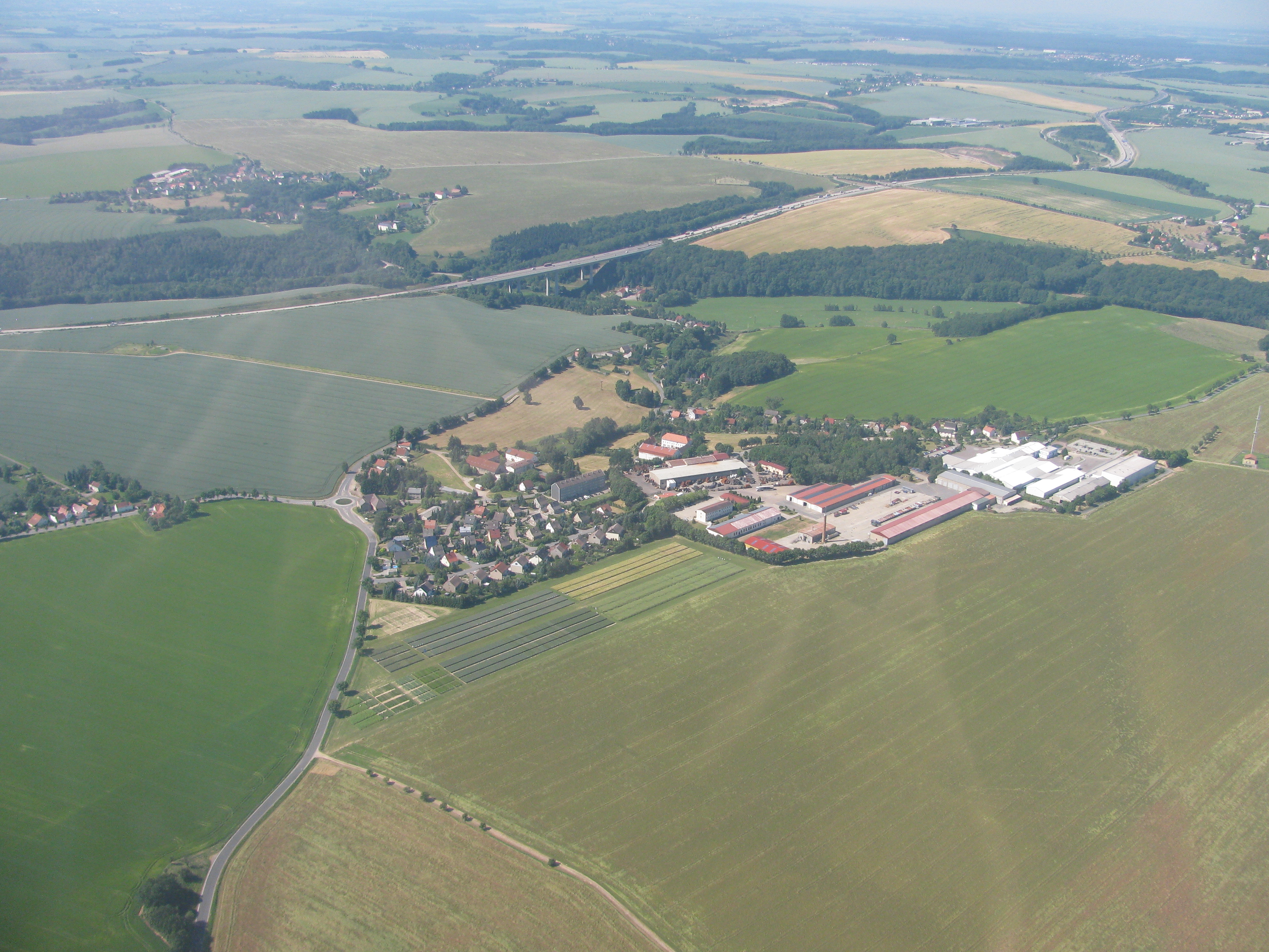 Luftbild Triebischtal-Groitzsch und Perne